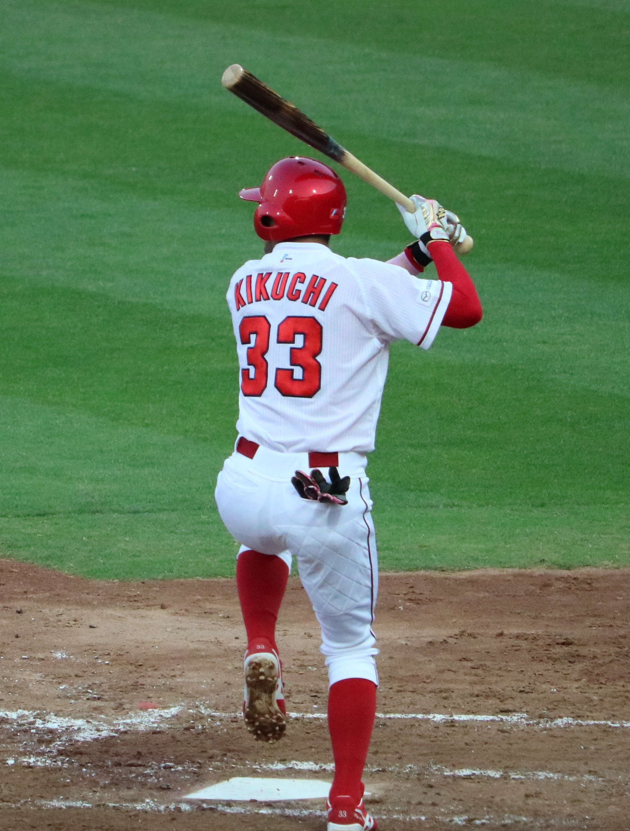 2017/6/15 MAZDA Zoom-Zoomスタジアム広島にて